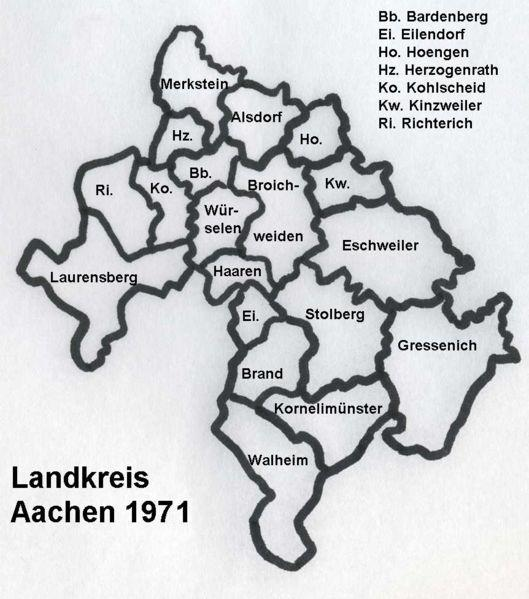 Der Landkreis Aachen in seinem Zustand 1972